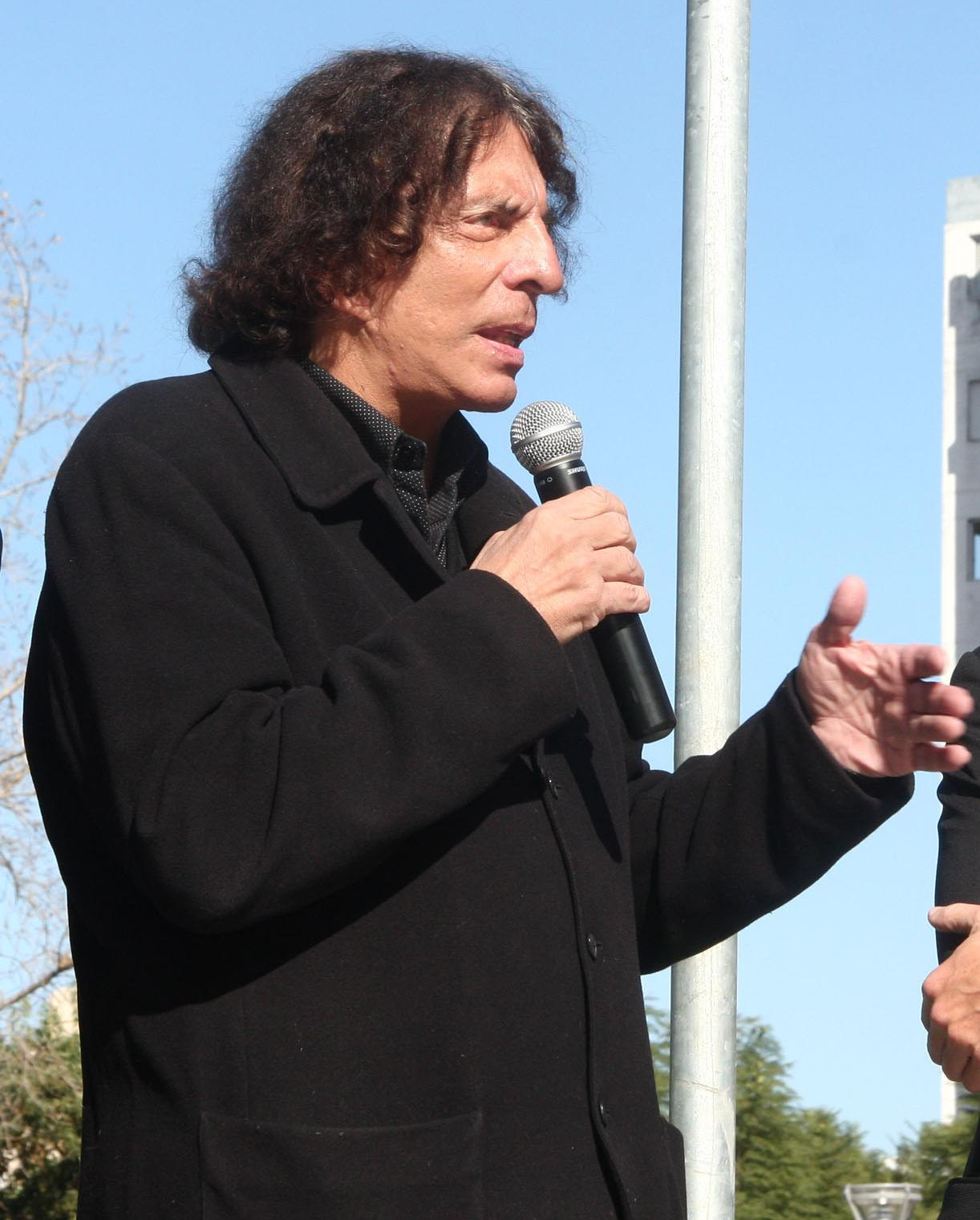 El escritor argentino Alejandro Dolina durante la inauguración de la Plaza del Ángel Gris (Ciudad de Buenos Aires, 2010)